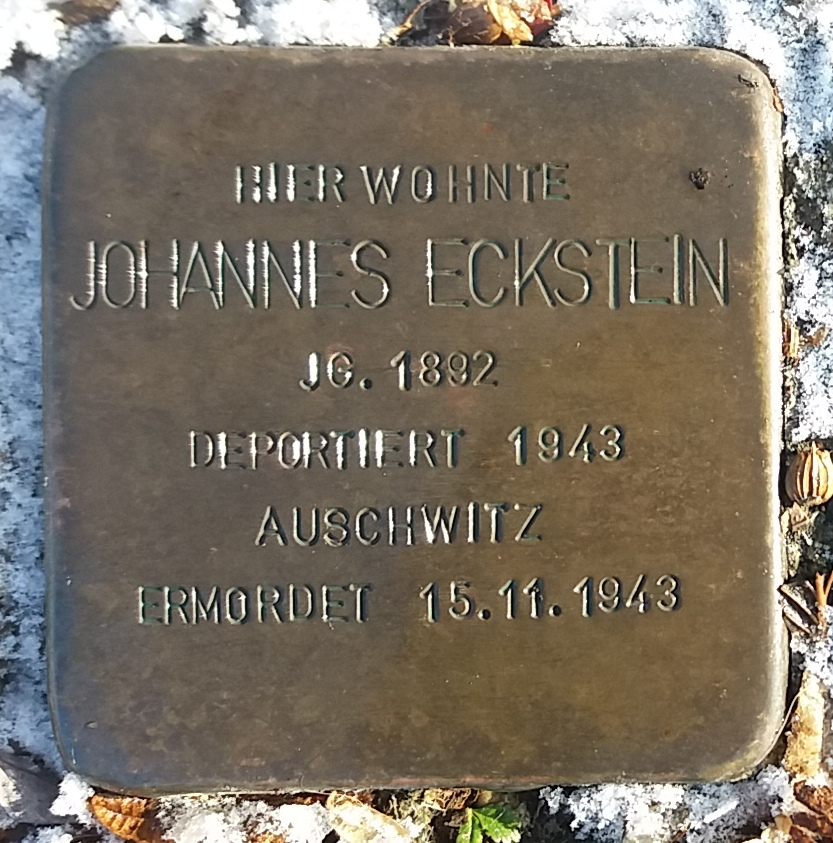 Stolperstein für Johannes Eckstein, Mitglied der Großfamilie Eckstein, Vöhringen (Iller)